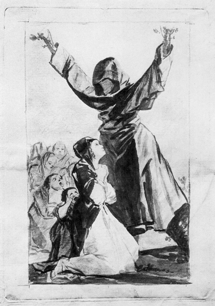 Dibujo preparatorio del capricho nª 52.